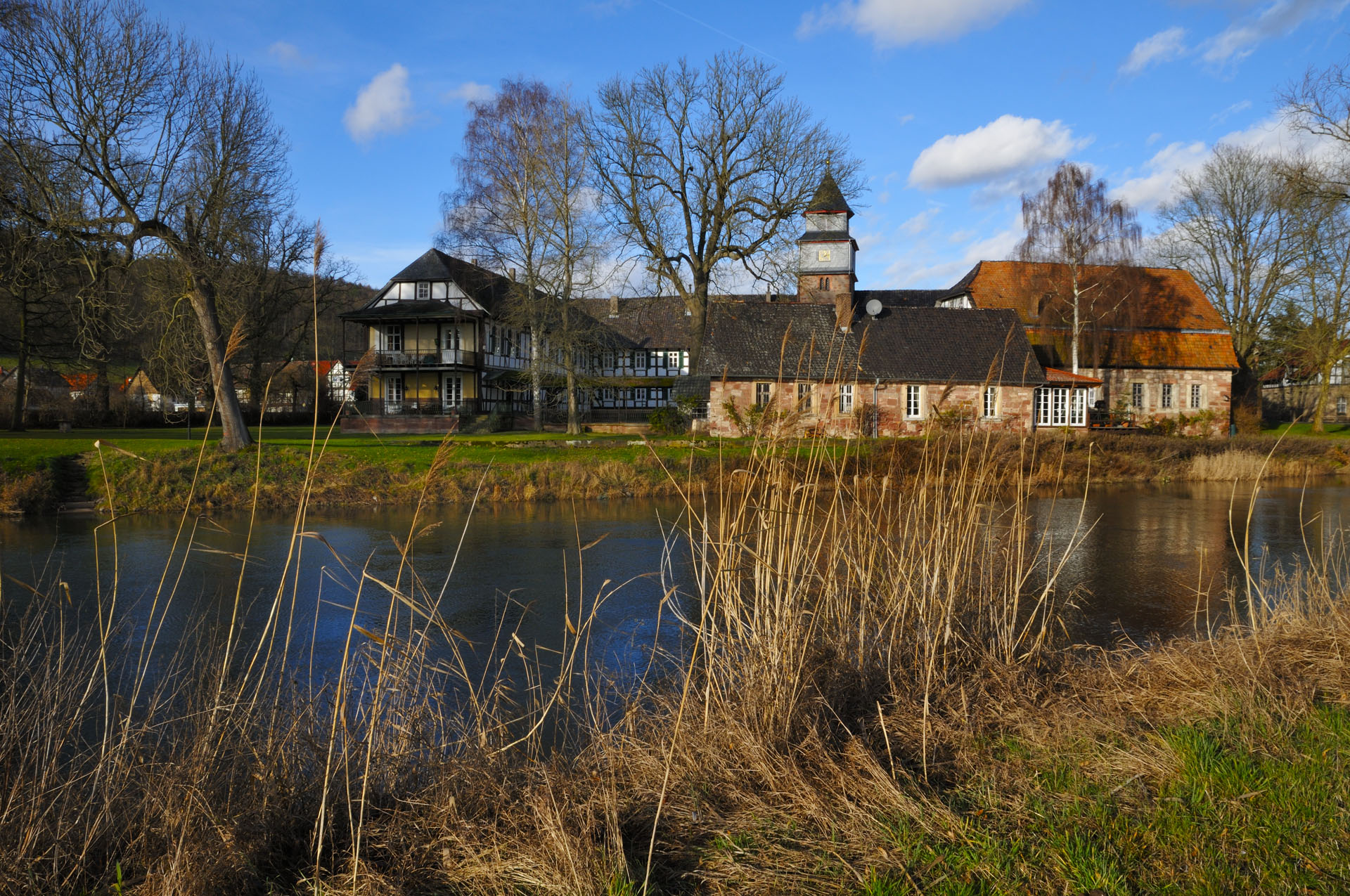 Rittergut Völkershausen - Blick über die Werra aus Süd